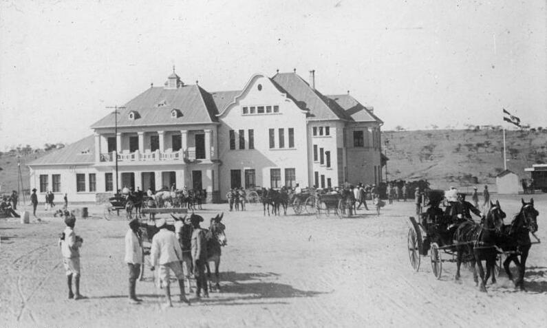 Deutsch-Südwestafrika, Windhuk nach Hereroaufstand Deutsch-Südwest-Afrika.- Windhuk / Windhoek.- nach dem Hereroaufstand, Bahnhofsgebäude